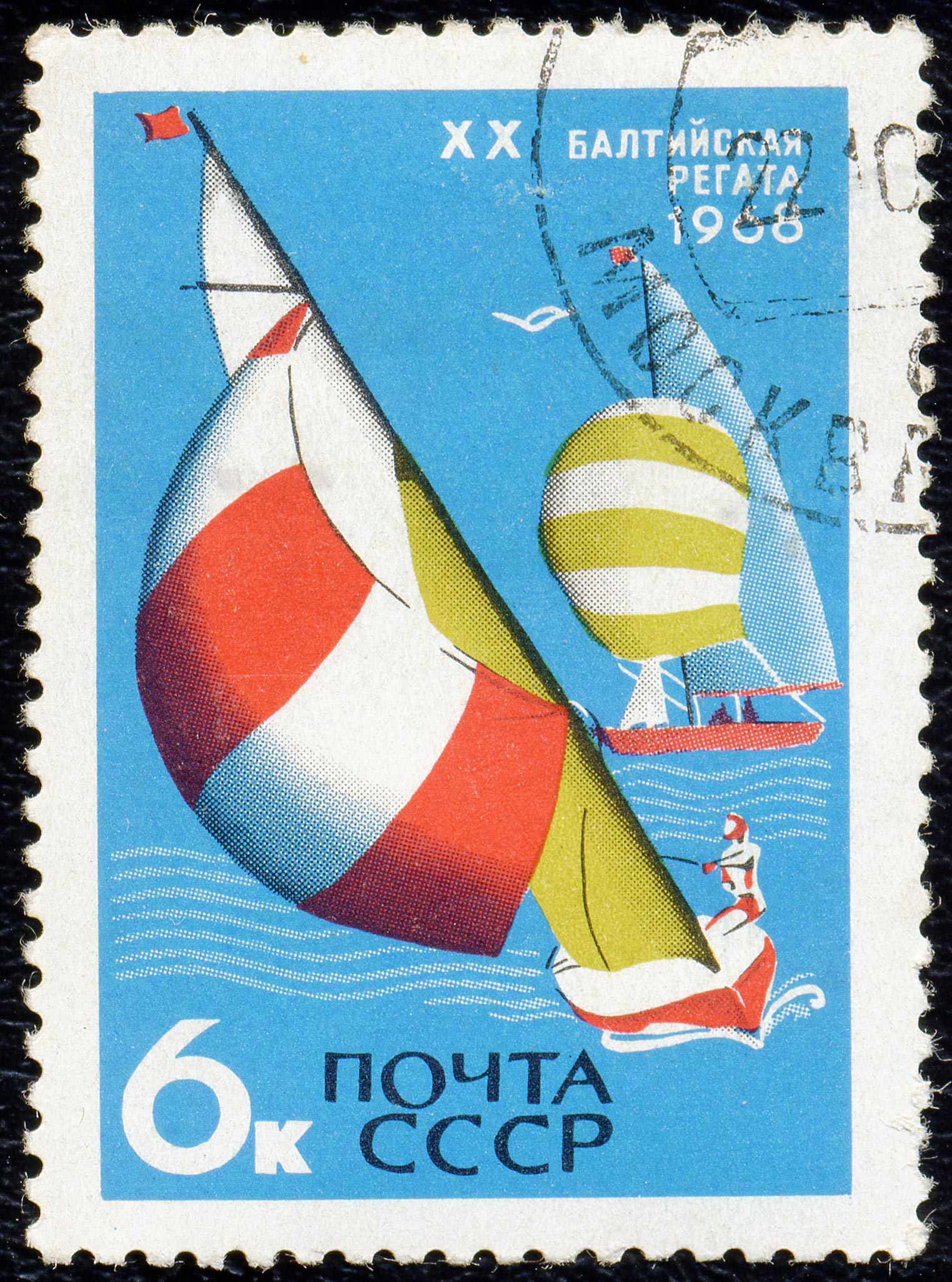 Почтовая марка СССР. 1968. XX Балтийская регата